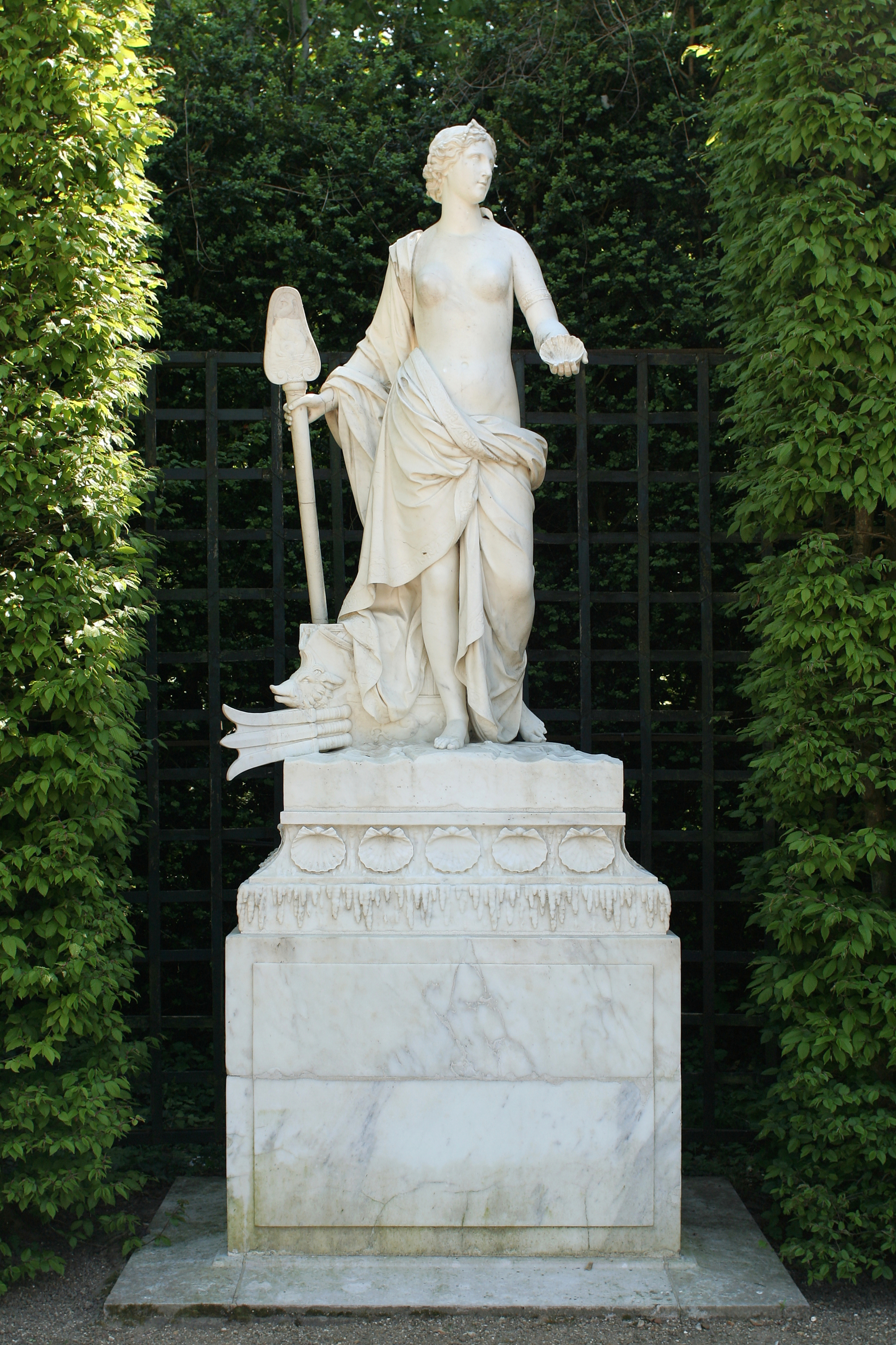 Ino devenue déesse marine sous le nom de Leucothoée, recevant les offrandes des nautoniers dont elle est la protectrice.